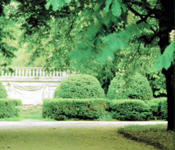 Palais_Schwarzenberg_Garten